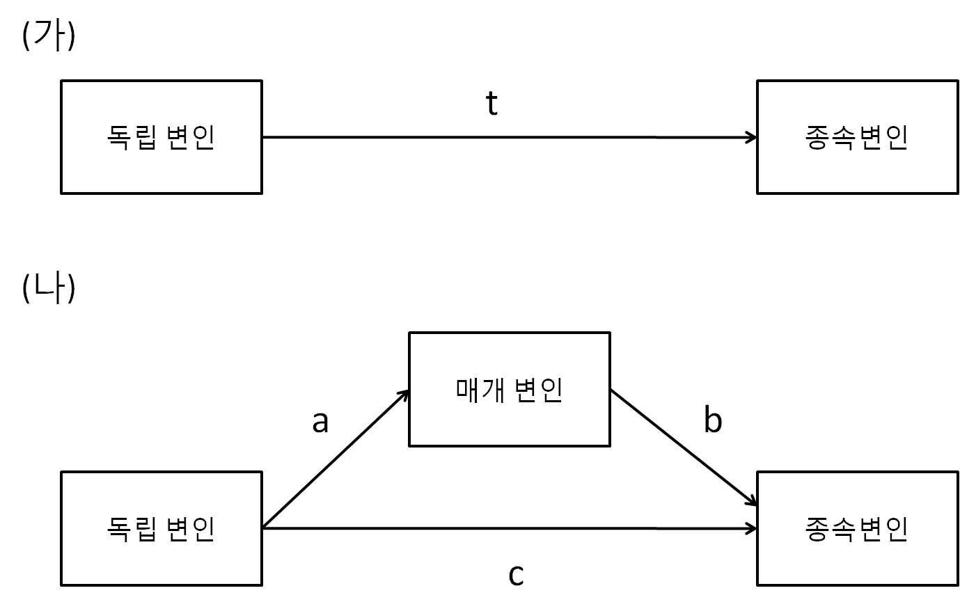 매개변인 효과를 설명하는 그림들